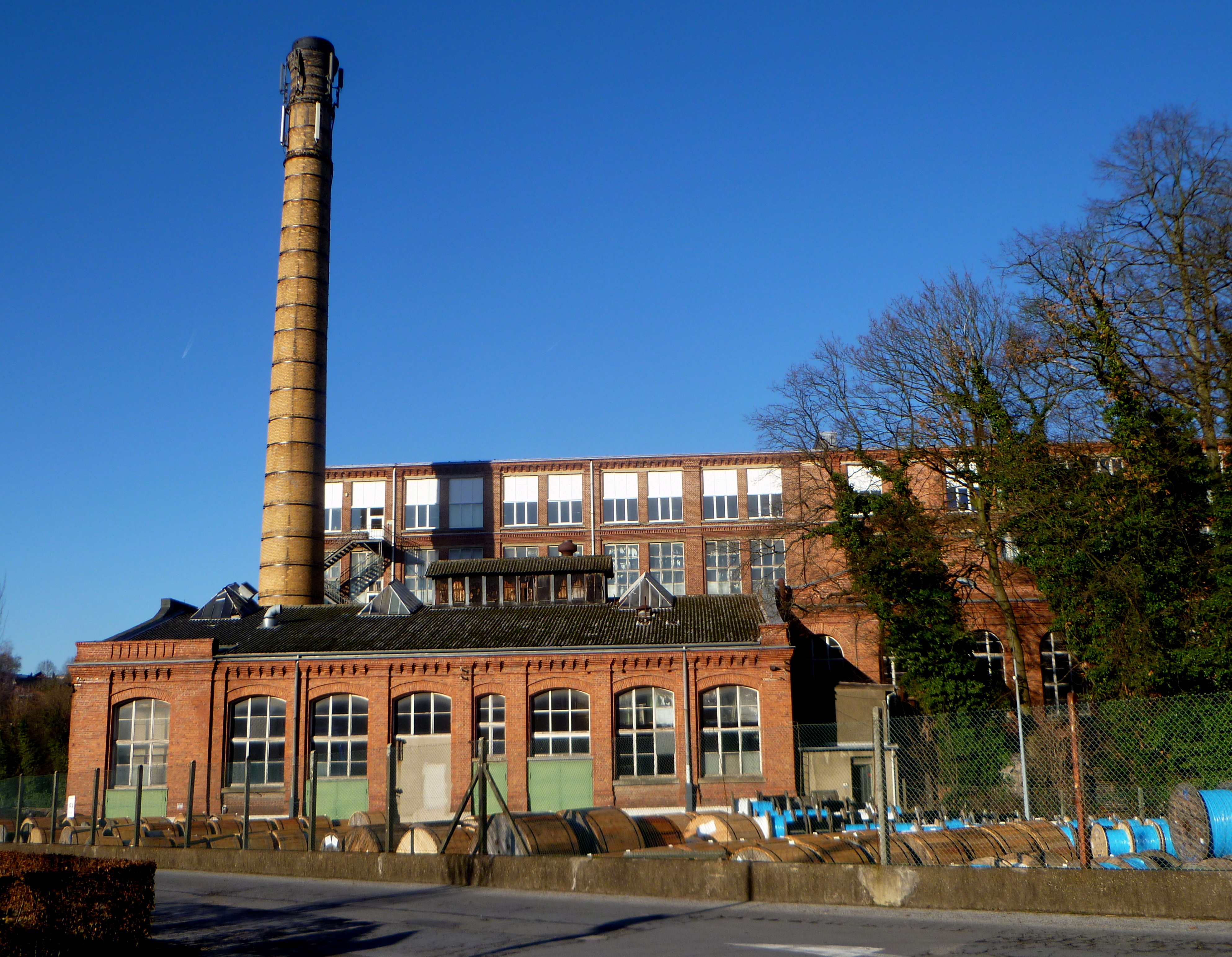 ehemalige Buntspinnerei und Maschinenraum der Kammgarnwerke AG in Eupen